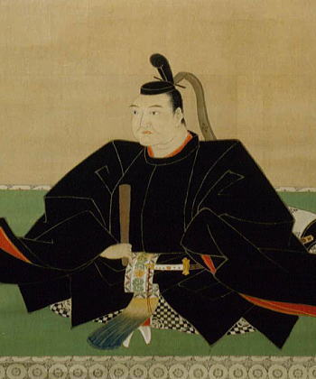 池田忠雄（第4代岡山城主）、Ikeda Tadakatsu(the 4th Okayama castellan)